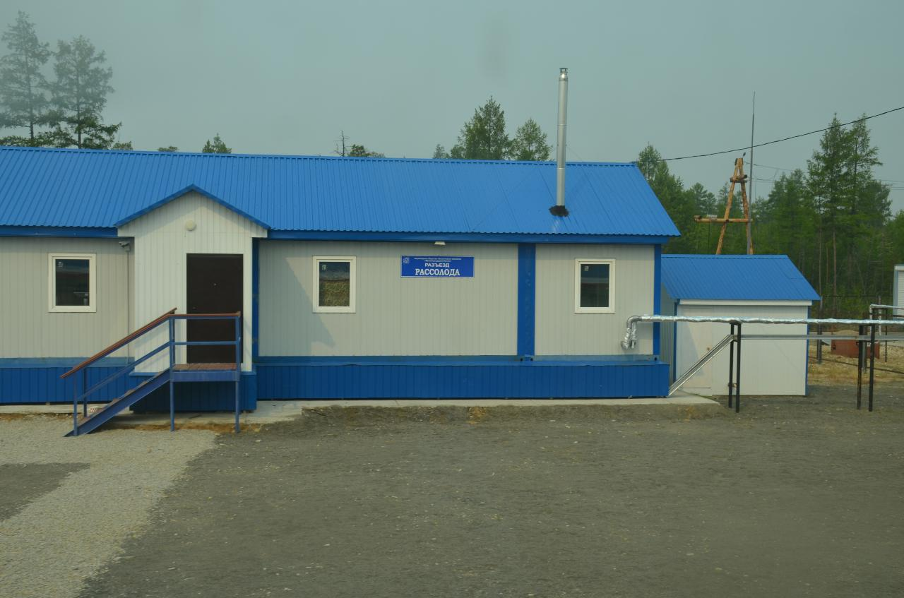 Поездка 5-6 августа 2019 г. по маршруту Якутск - Нерюнгри - Якутск во вновь назначенном поезде № 327 Нижний Бестях - Нерюнгри. Историческое событие - пуск пассажирского движения поездов из центральной Якутии, почти из Якутска. Разъезд Рассолода (37 км)